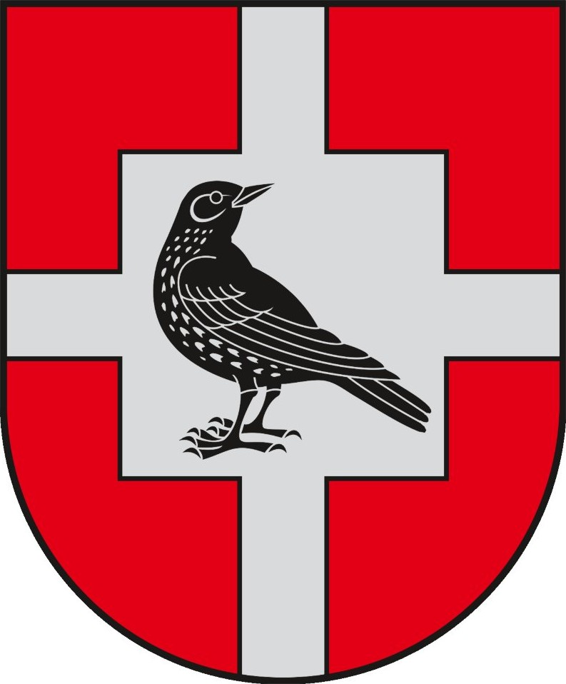 Kamajų herbas